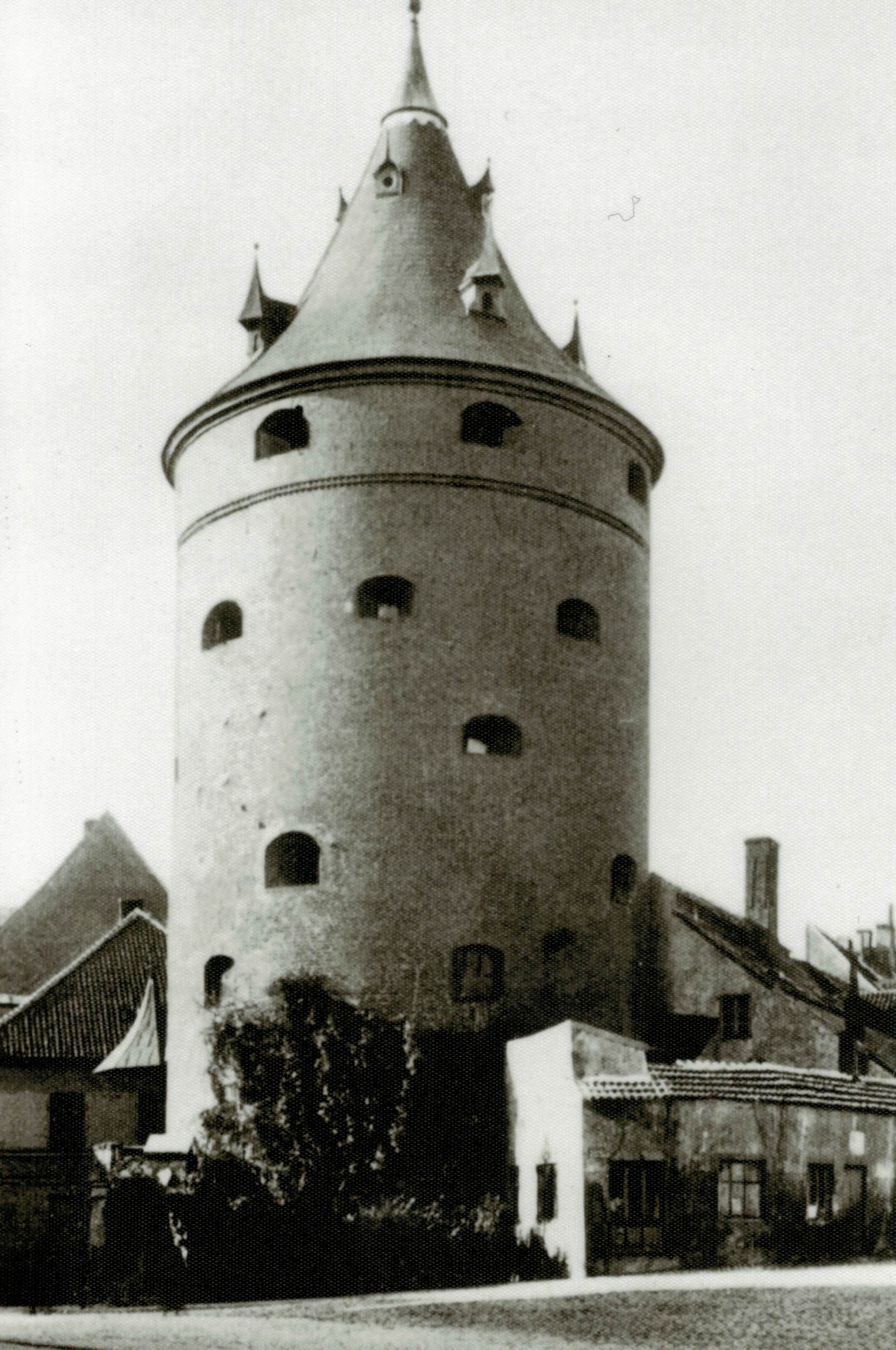 Convents-Quartier des Corps Rubonia in Rigas Pulverturm